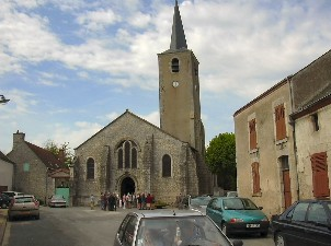 Eglise de Sougy